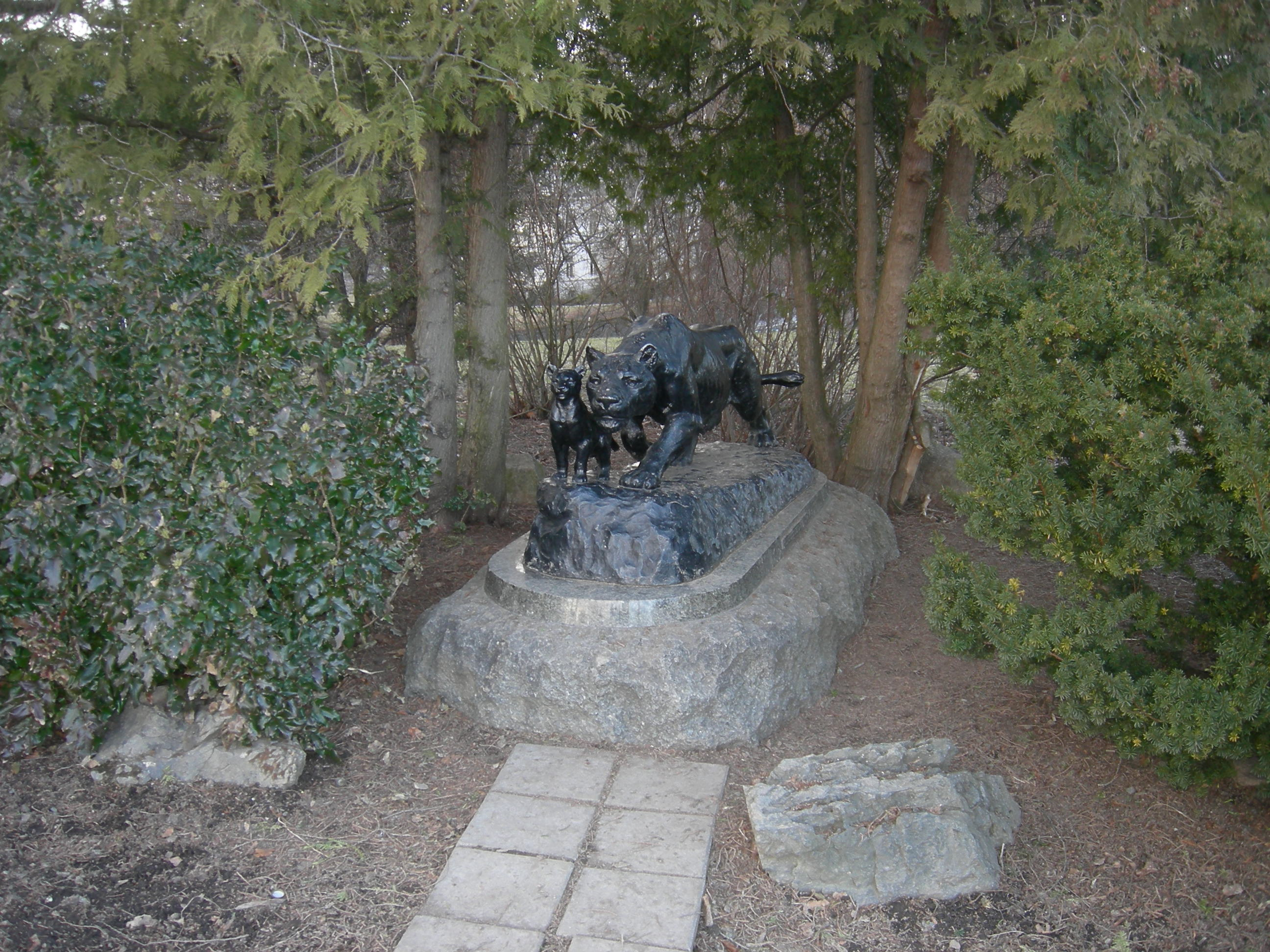 Skulpturen Løvinne med unger, St. Hanshaugen park, Oslo